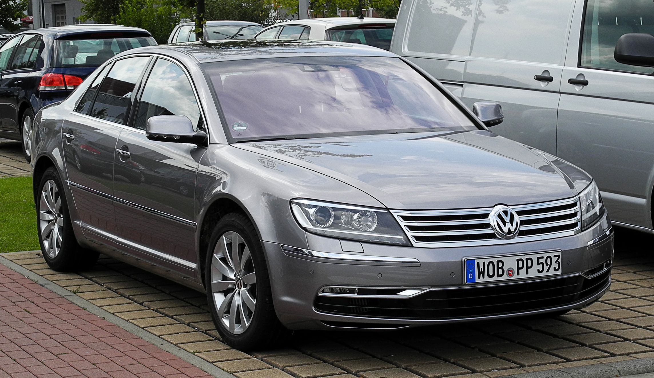 VW Phaeton 3.0 V6 TDI 4MOTION (2. Facelift)